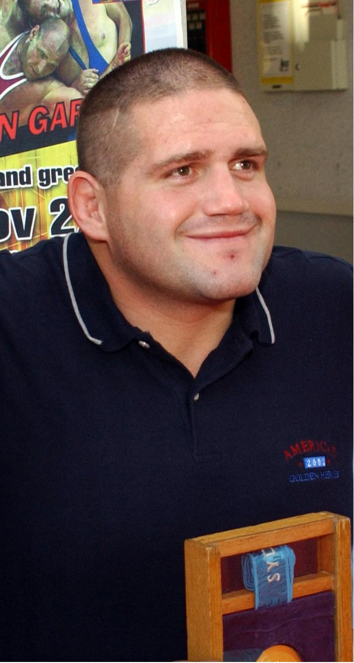 Рулон Гарднер, переработка свободной фотографии File:Rulon Gardner 2002.jpg